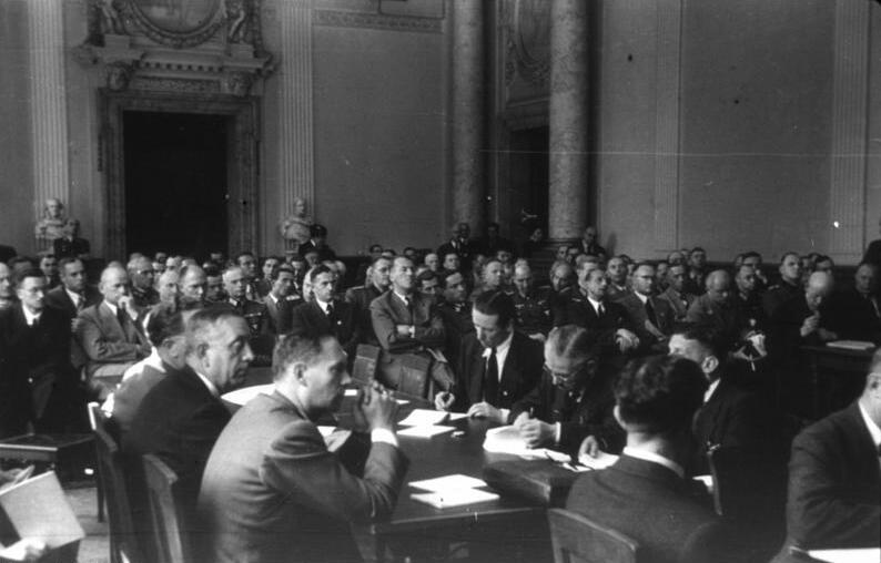 Volksgerichtshof, Prozesse nach dem 20. Juli 1944 Prozeß 20. Juli 1944 [Berlin.- Volksgerichtshof, Prozeß 20. Juli 1944]